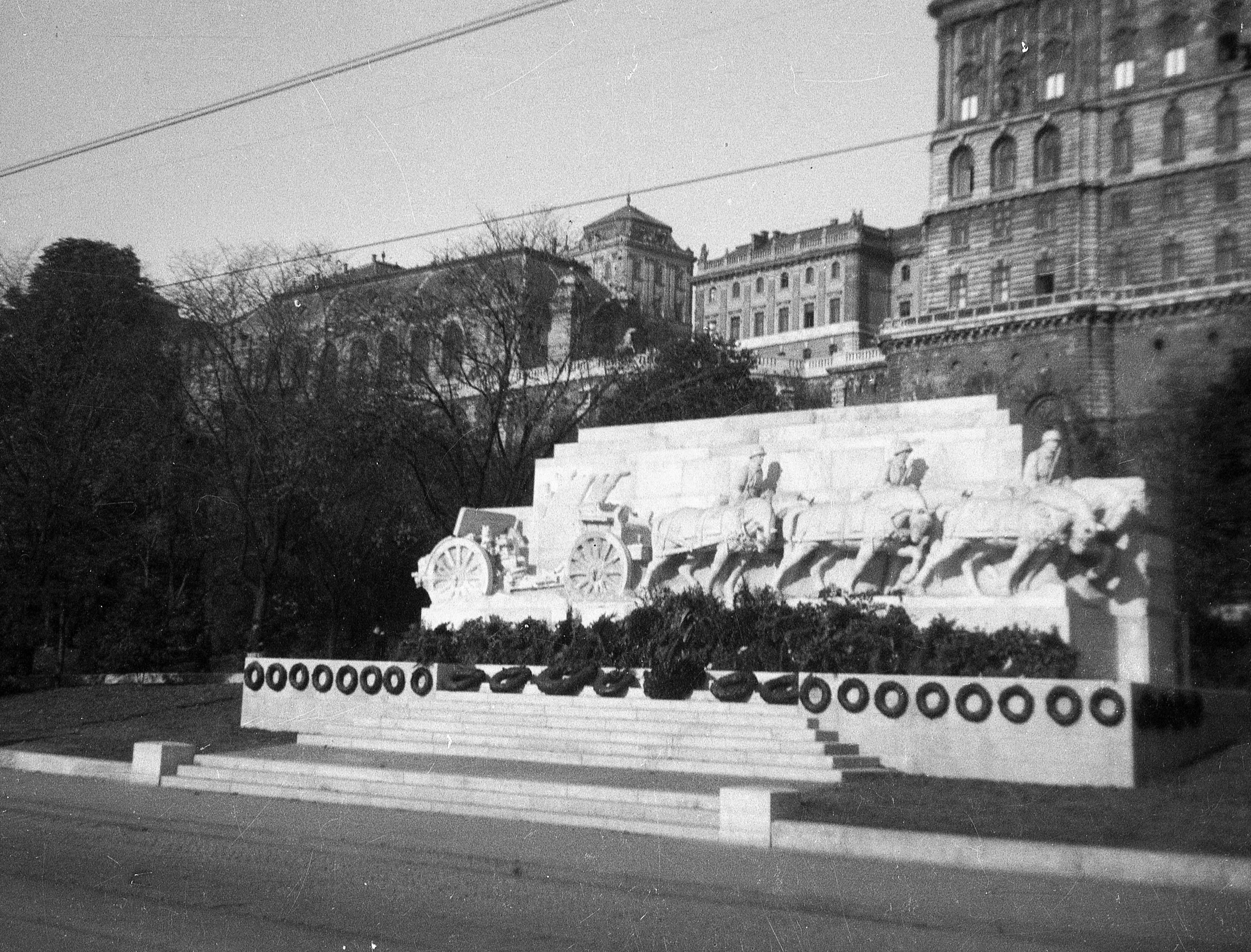 Dózsa György (Palota) tér, Ligeti Miklós alkotása (1937), a Lovas tüzérek hősi emlékműve (ma Dózsa György szobor áll a helyén). Mögötte a Lovarda, a a főőrségi épület és Királyi Palota. Location: Hungary, Budapest I. Tags: monument, Budapest Title: Dózsa György (Palota) tér, Ligeti Miklós alkotása (1937), a Lovas tüzérek hősi emlékműve (ma Dózsa György szobor áll a helyén). Mögötte a Lovarda, a a főőrségi épület és Királyi Palota.